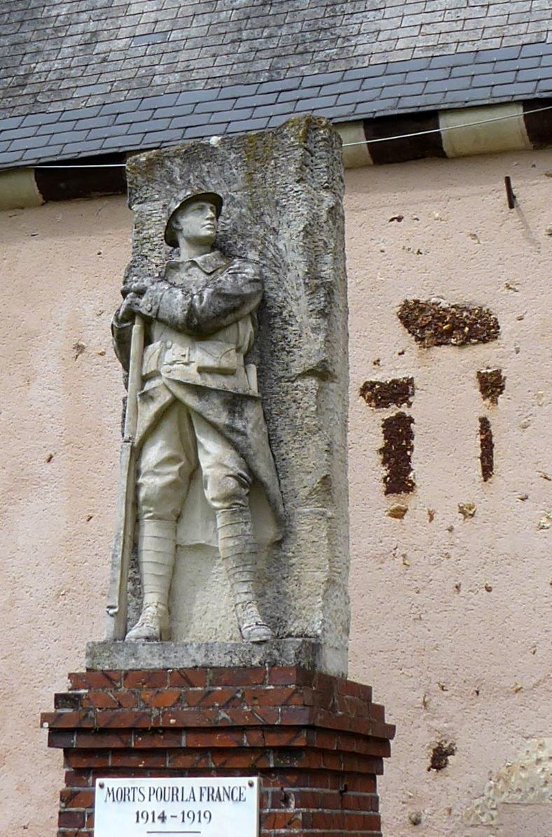 Monument aux morts de Félix Charpentier inauguré en 1921, Chassant, Eure-et-Loir (France).